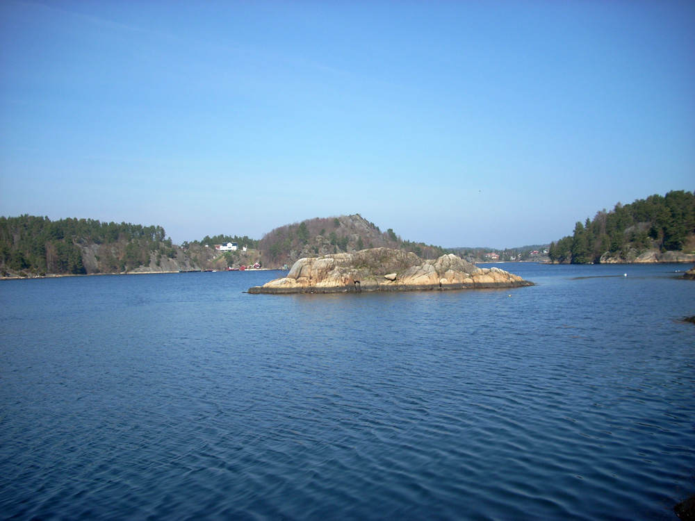 Gartafjorden i Arendal, Norge